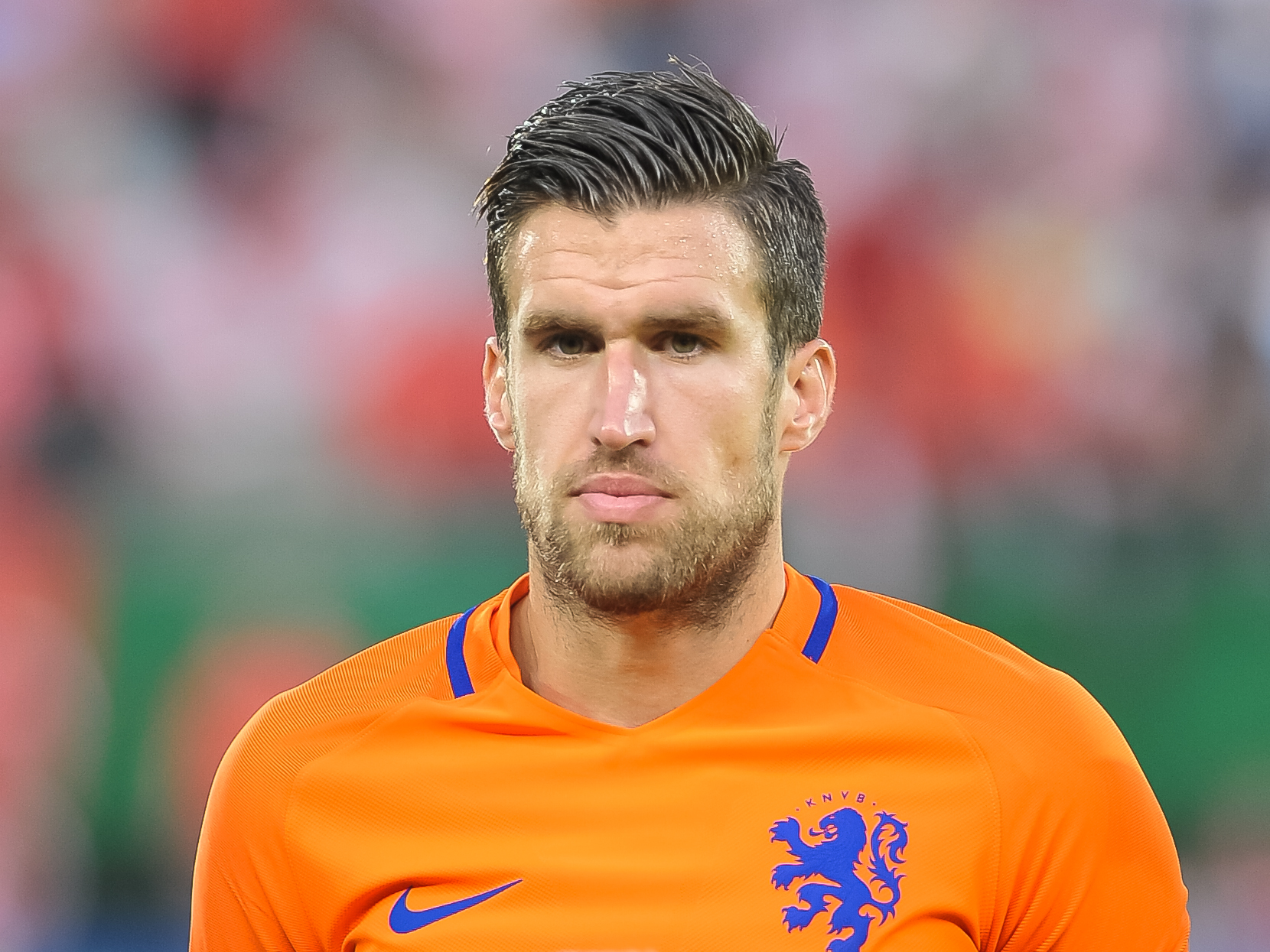 Wien, 4.6.2016, ÖFB Laenderspiel - Österreich vs Niederlande. Bild zeigt Kevin Strootman (NED).